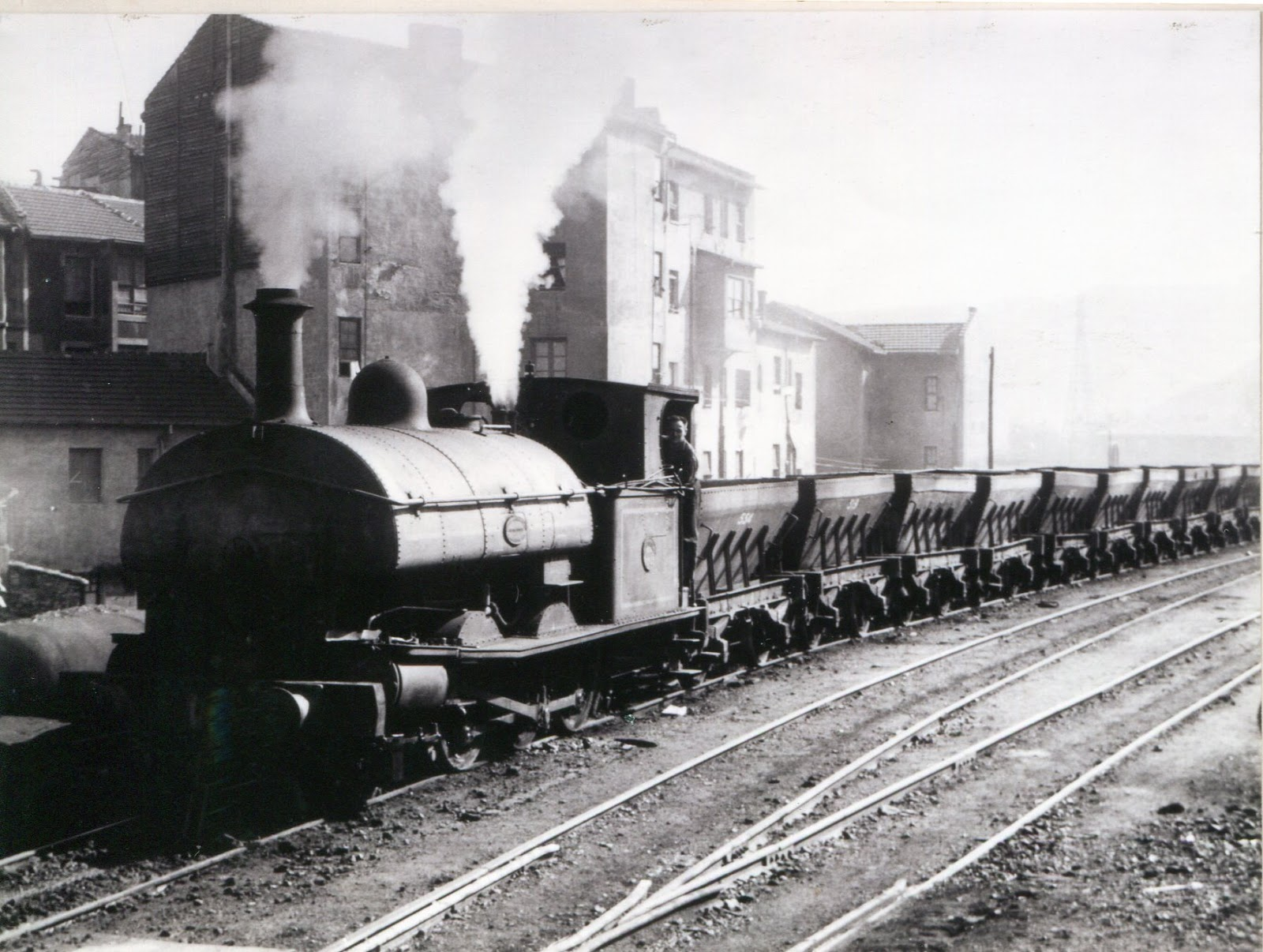 Orconerako trena. Images between 1890-1910